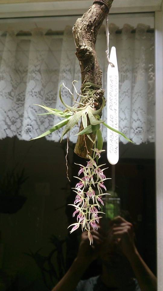 Diablillo Púrpura - En flor, Julio de 2014